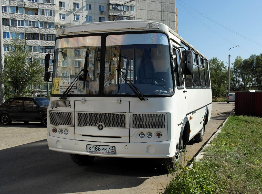 ПАЗ 32054 последнего поколения, выпускается с конца 2014 года